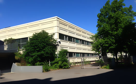 Radiotalon suurtuotantosiipi Radiokujalta päin. Radiokatu 5, Helsinki. Arkkitehti: Kurt Simberg.